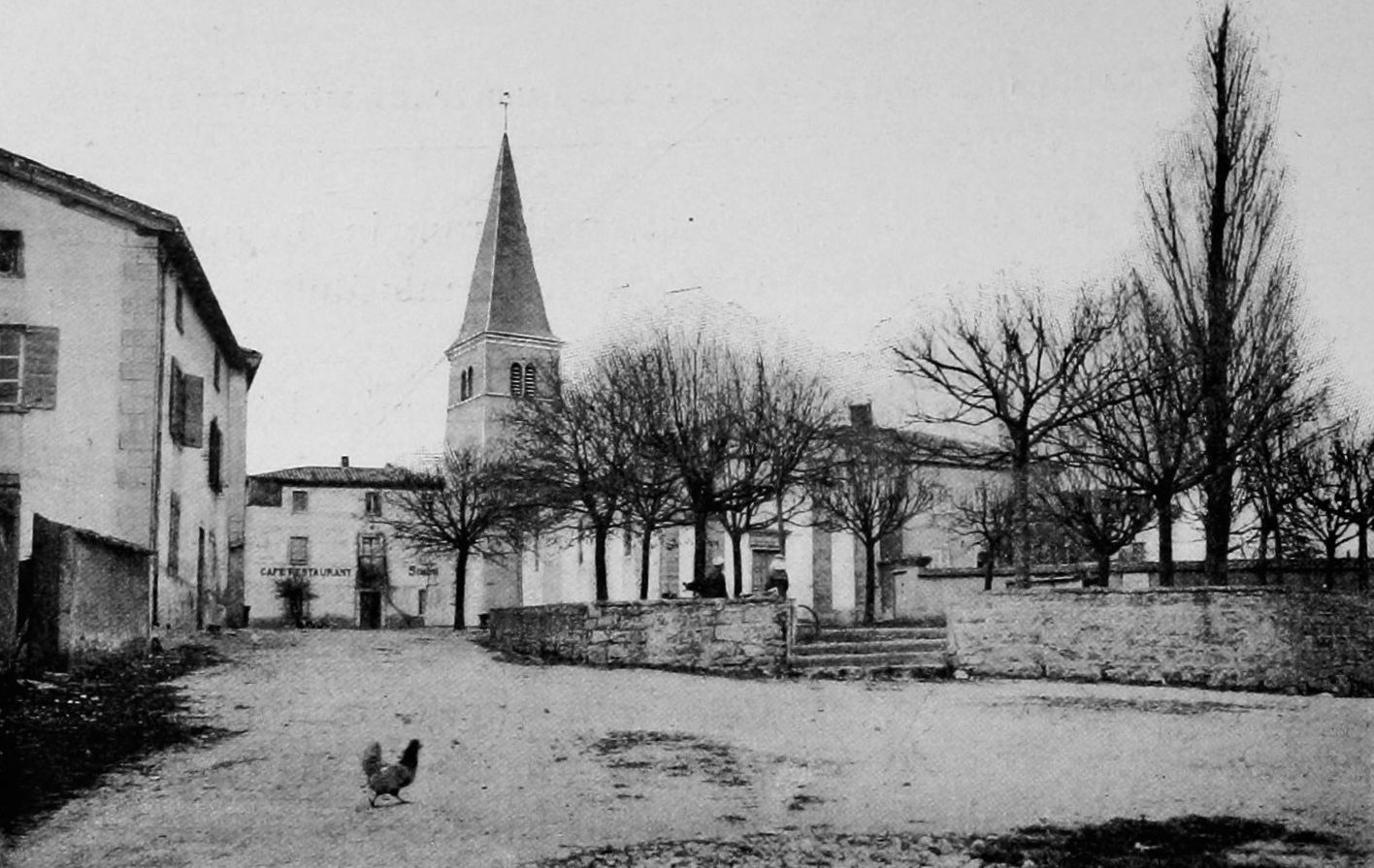 Dictionnaire illustré des communes du département du Rhône. Tome 2 / par MM. E. de Rolland et D. Clouzet.